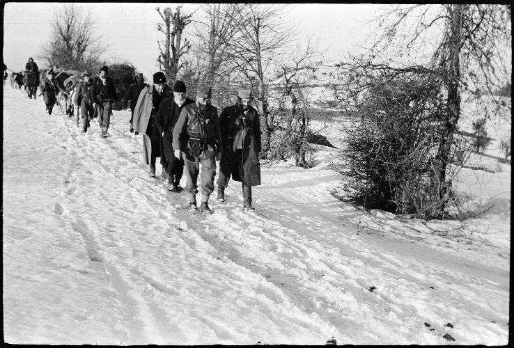 Četnički komandanti Predrag Rakoviž i Draža Mihailović